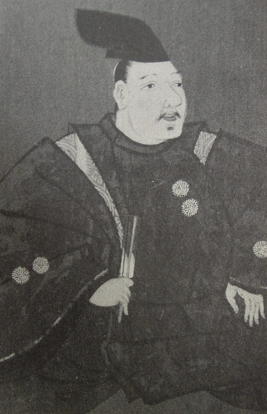 水野忠央の写真